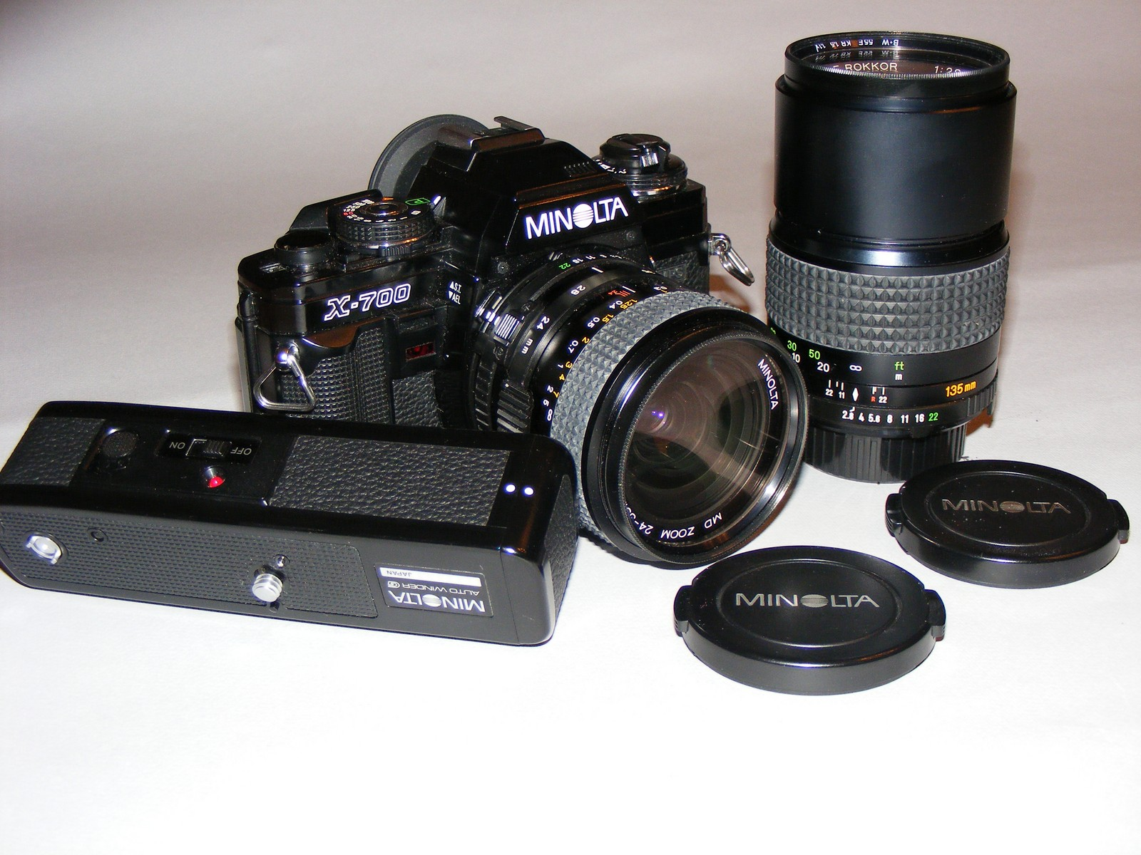 DSCF5260 Minolta X-700